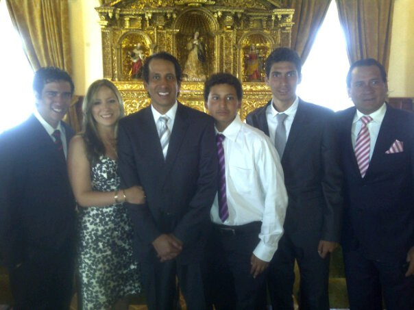 En Carondelet -Su hijo mayor Francisco Andres Cevallos M, Su esposa Rosa Enriquez de Cevallos, José Francisco Cevallos V, Gabriel Cevallos E, Junior Cevallos E, y Alex Cevallos V.